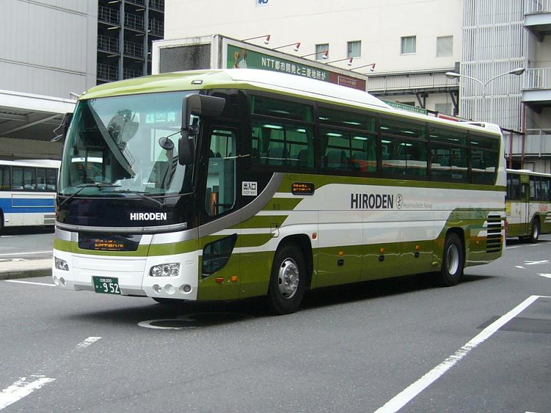 登録番号 広島200か・952 広島電鉄所属 クレアライン号用 2007年2月26日 広島バスセンターにて撮影